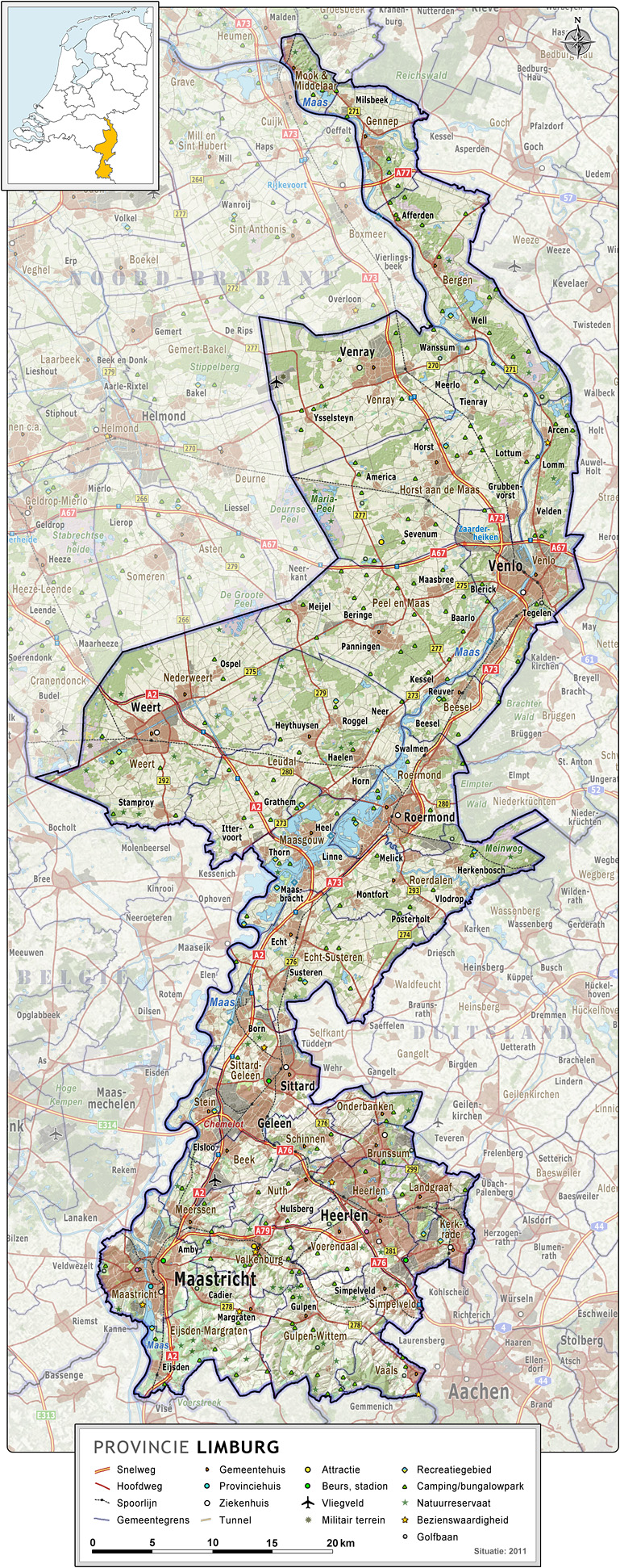 Provincie Limburg, met indeling van gemeenten (2011) en impressie van het landschap. Door Jan-Willem van Aalst, samengesteld uit publiek beschikbare geo-data: Referentie-ondergrond (kustlijn, steden, wegen) gerasterd uit de OpenStreet Map OSM. ( Inhoud is beschikbaar onder de Creative Commons Attribution-ShareAlike 3.0 license. Referentie-ondergrond op water bewerkt vanuit Gebruik is vrij met bronvermelding NLR en ESA. Vectorgrenzen van gemeenten en regio's vrij ter beschikking gesteld met dank aan cartografen van brandweerregio's Hollands-Midden en IJsselland; gerasterd in Photoshop. Hoogte-aanduidingen (reliëf) gerasterd uit de AHN Viewer ( gebruik is vrij met bronvermelding (c) AHN, Locaties verblijfsrecreatie (campings) op basis van Borisweb ( van Kenniscentrum recreatie. Gebruik is vrij, met bronvermelding. Overige kenmerken op de kaart: eigen tekenwerk van Jan-Willem van Aalst, op basis van gerasterde gemeentegrenzen.